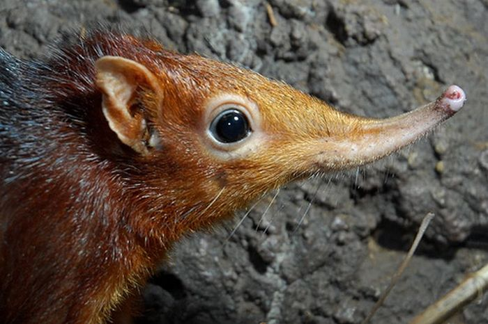 Короткоухий стрибунець